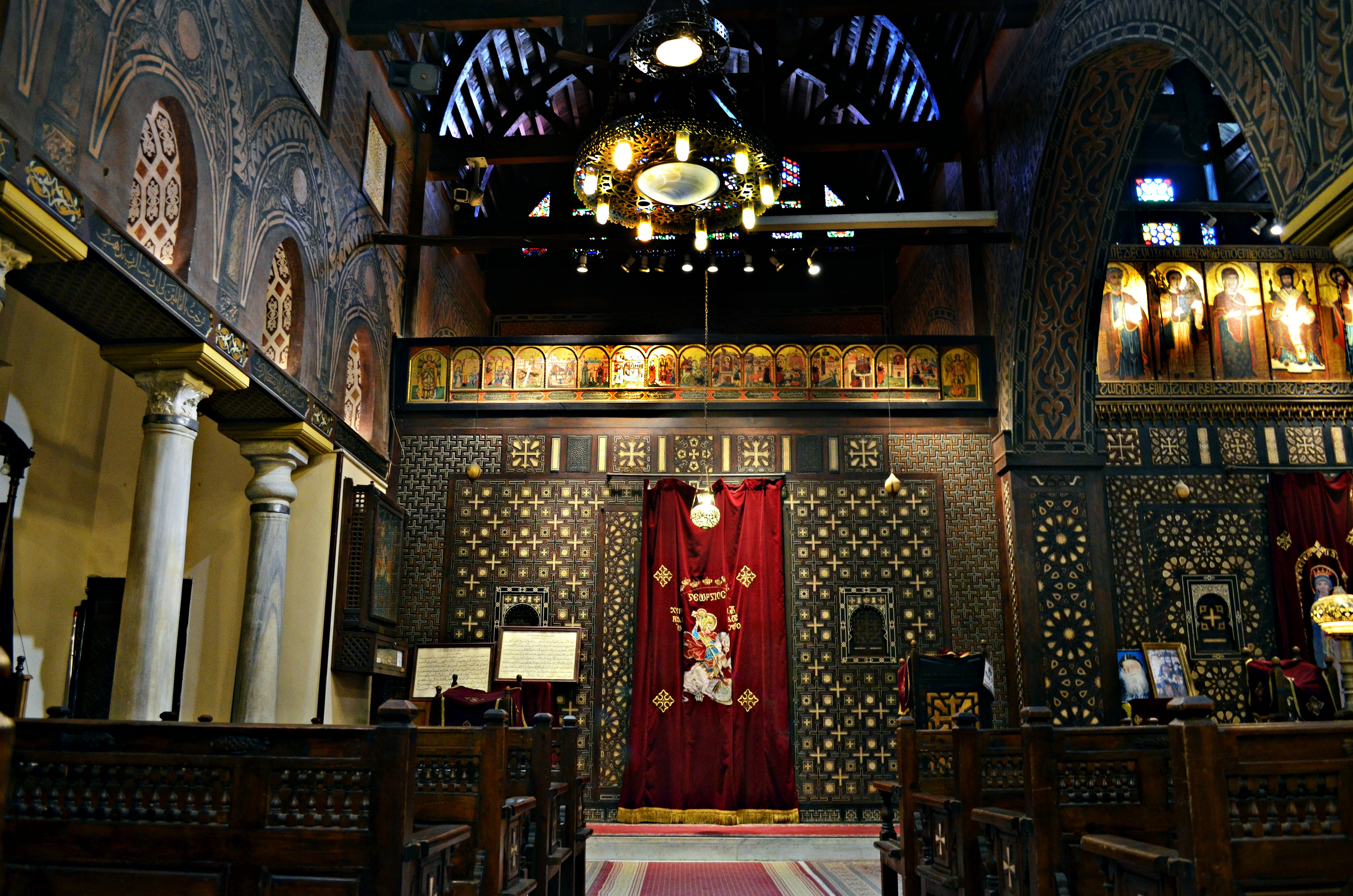 هيكل الكنيسة المعلقة بمصر القديمة، القاهرة.